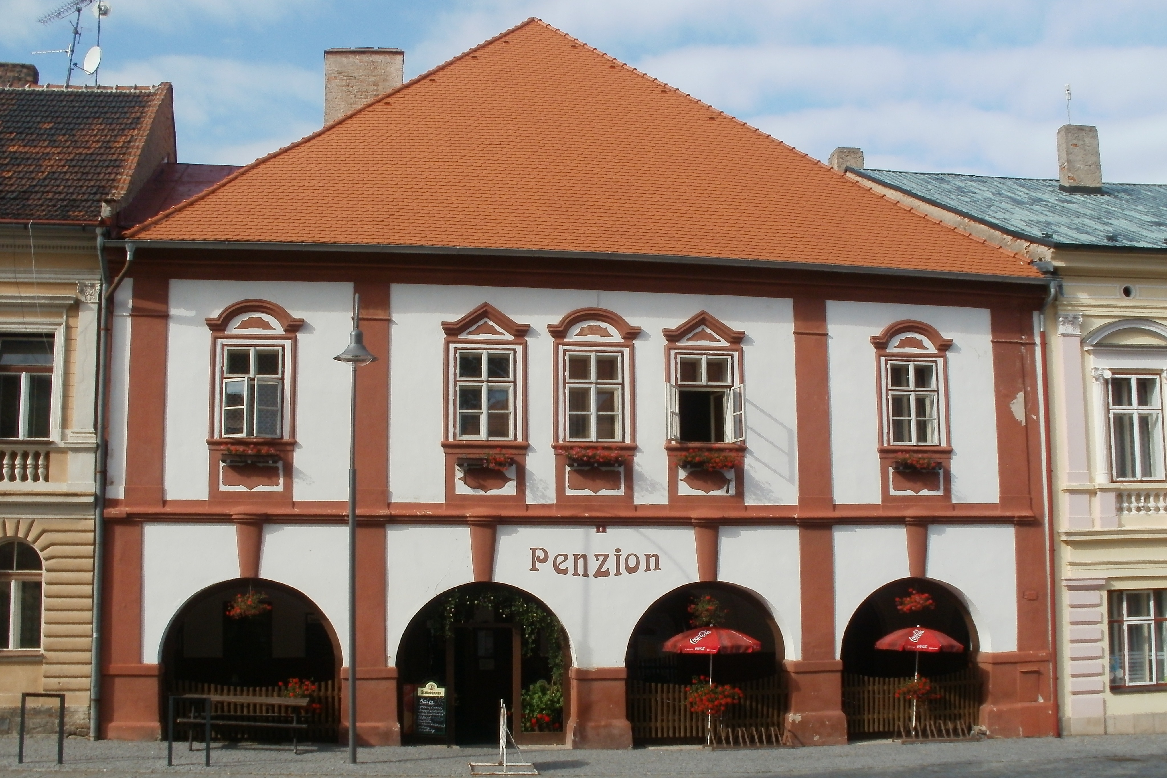 Měšťanský dům (Opočno), Trčkovo nám. 9, Opočno